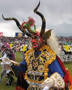 Diablo puneño. Perú. Diablada.